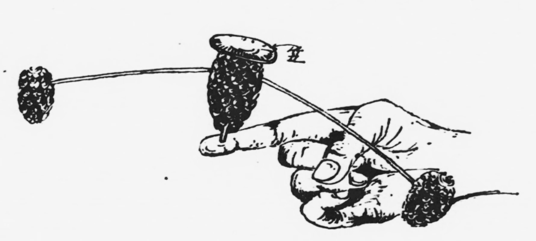 松かさのやじろべえ